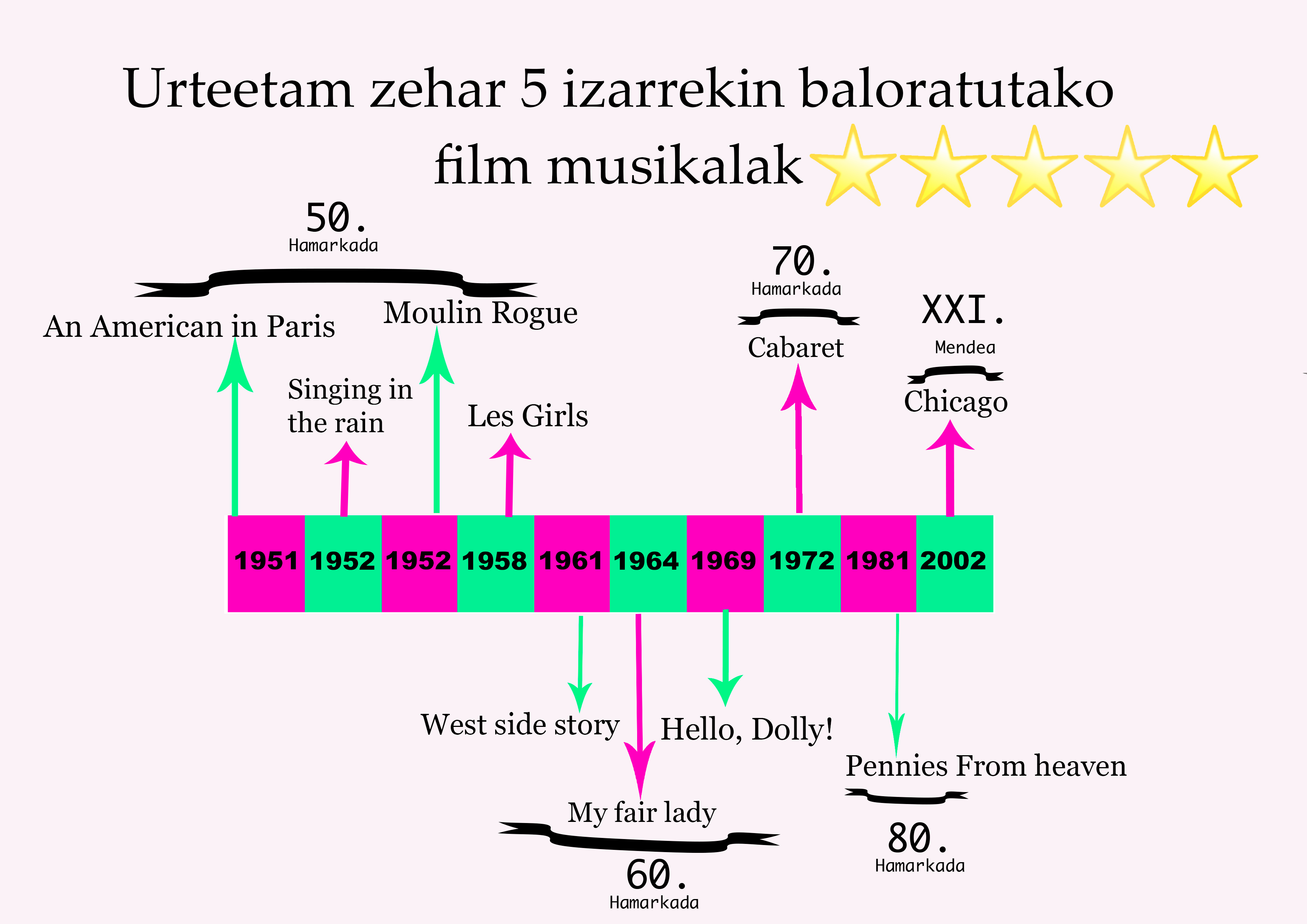 Urteetan zehar 5 izarrekin baloratutako film musikalak